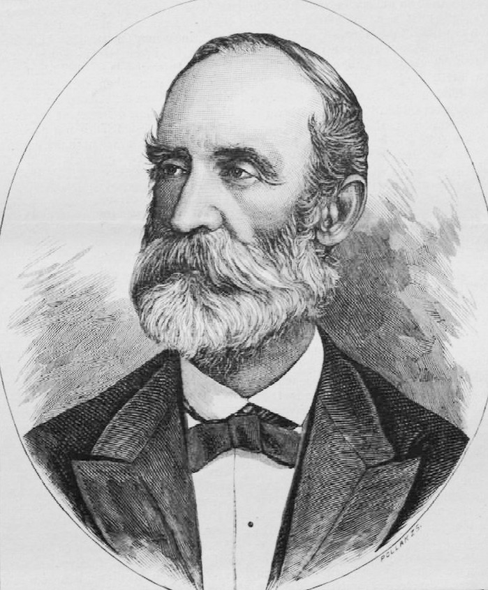 Hunfalvy János (1820–1888) földrajztudós, akadémikus portréja. Pollák Zsigmond metszete